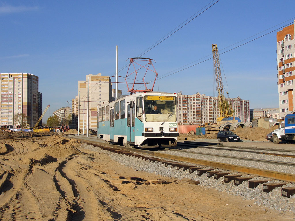 Трамвай 71-402 №2203 в Казани